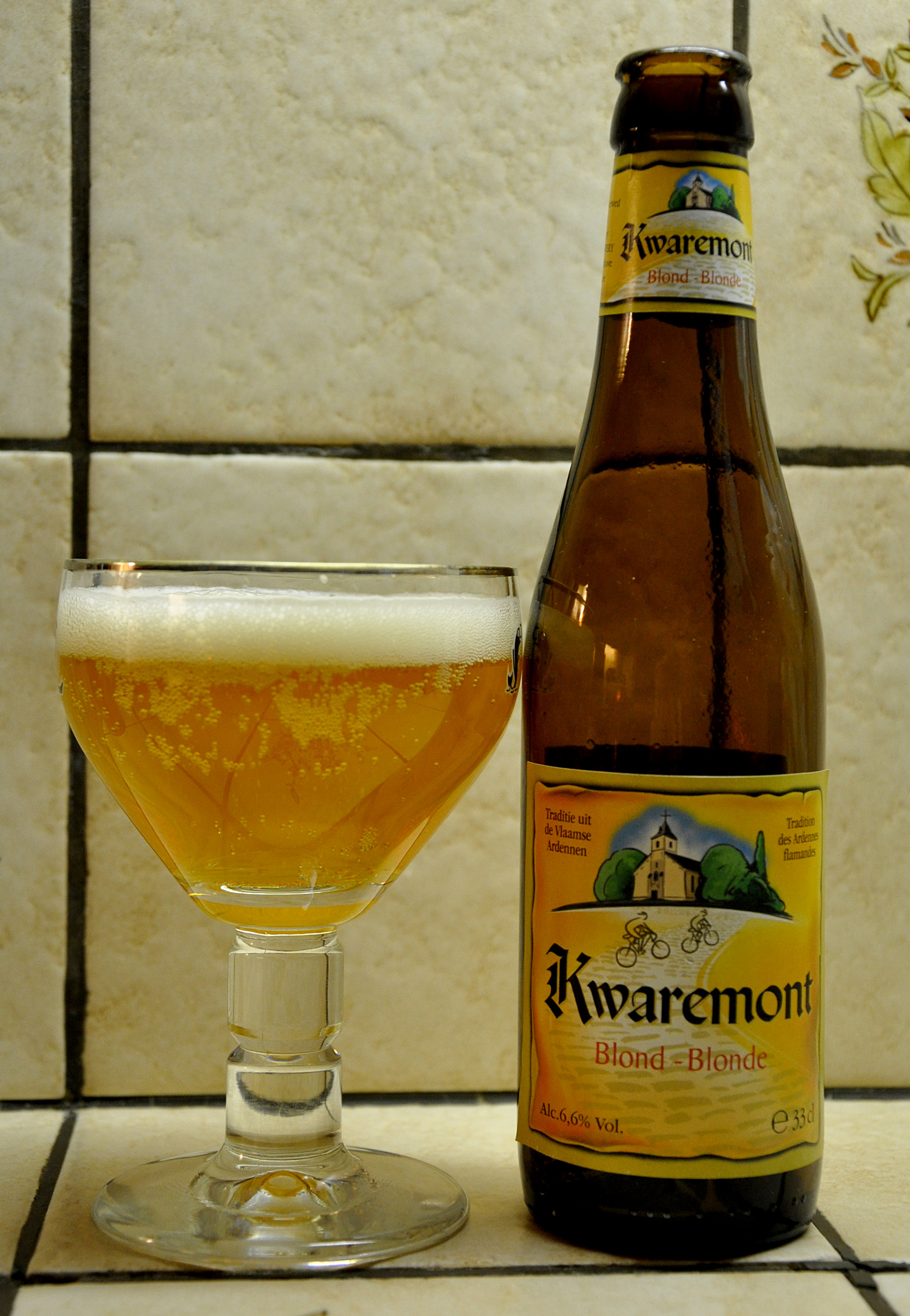 Kwaremont